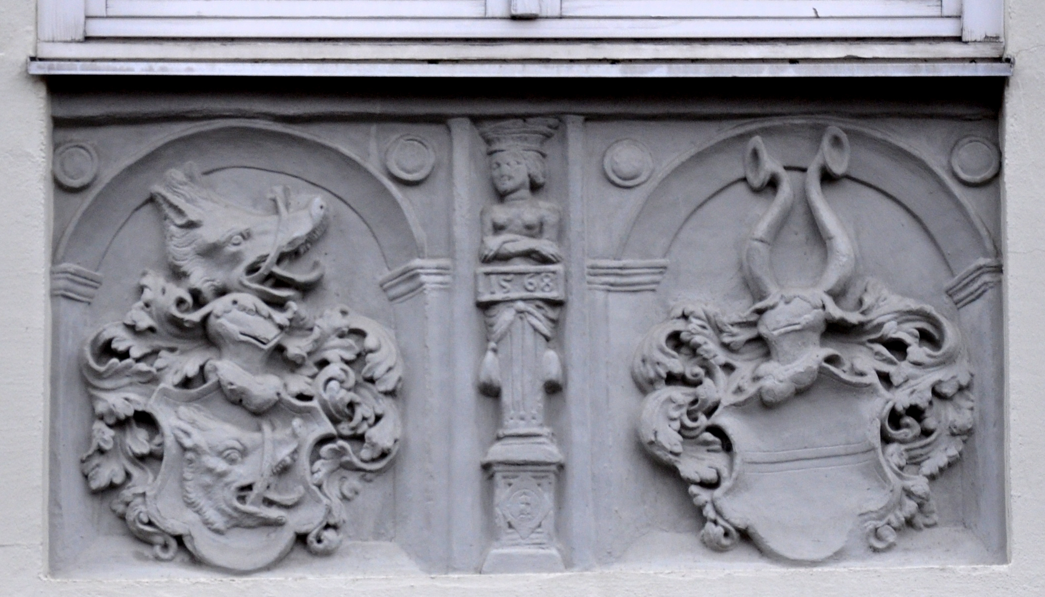 Isny im Allgäu, Wassertorstraße 7, Wappenrelief mit den Wappen des Jacob Eberz (1525–1608) und seiner Ehefrau Barbara Greck von Stockendorff (geteilt von Gold und Blau), 1568